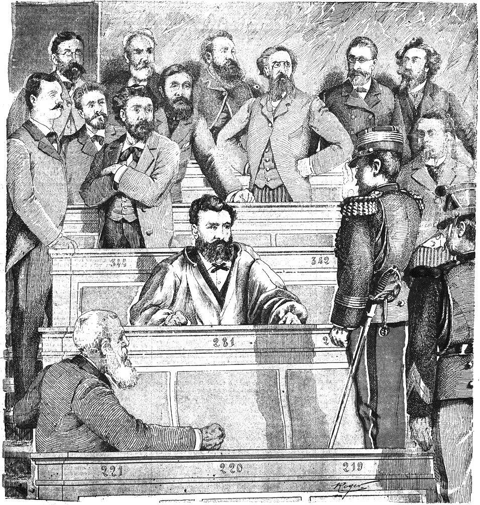 "L'expulsion de Thivrier à la Chambre".